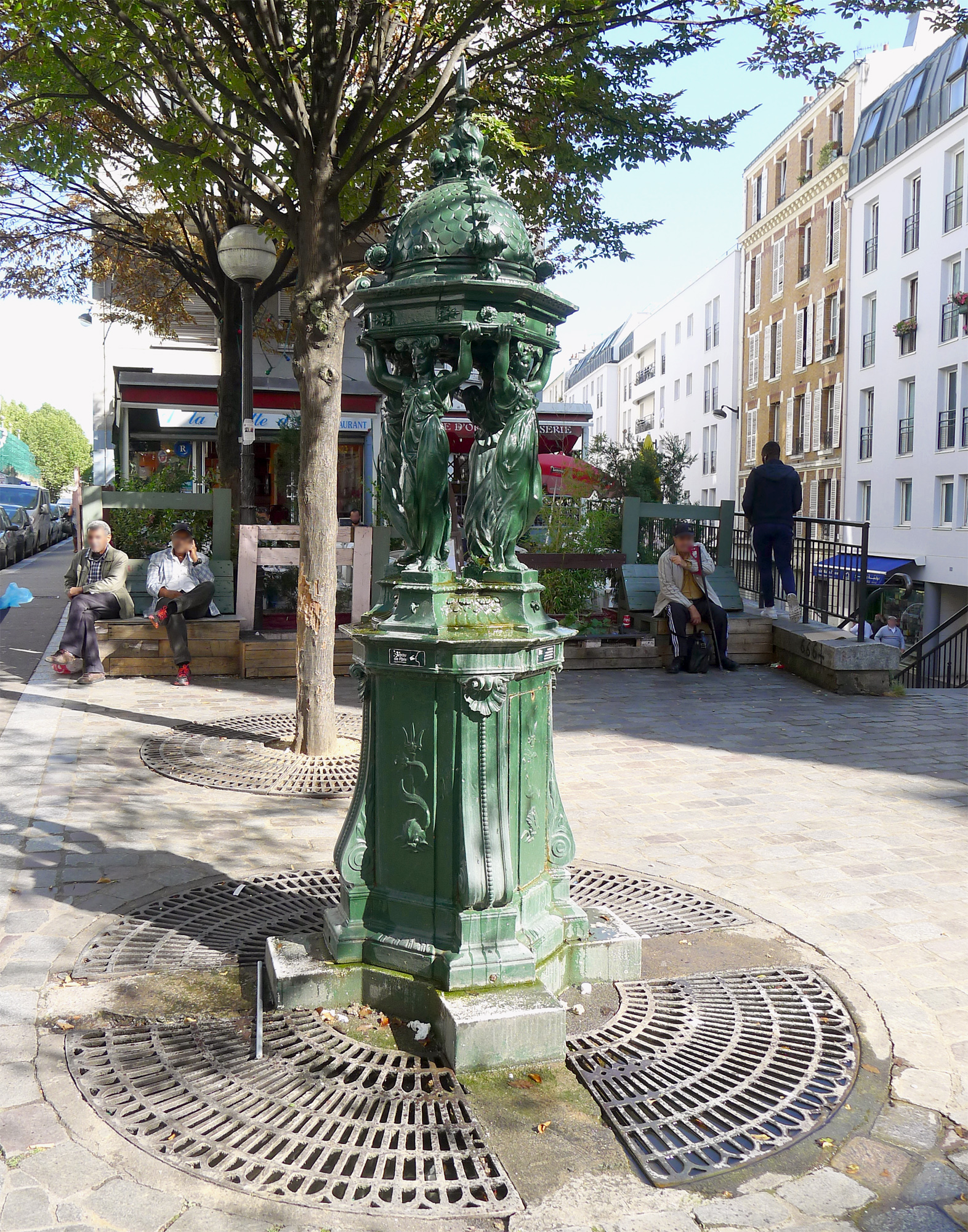 Rue de la Goutte-d'Or (fontaine Wallace) - Paris XVIII